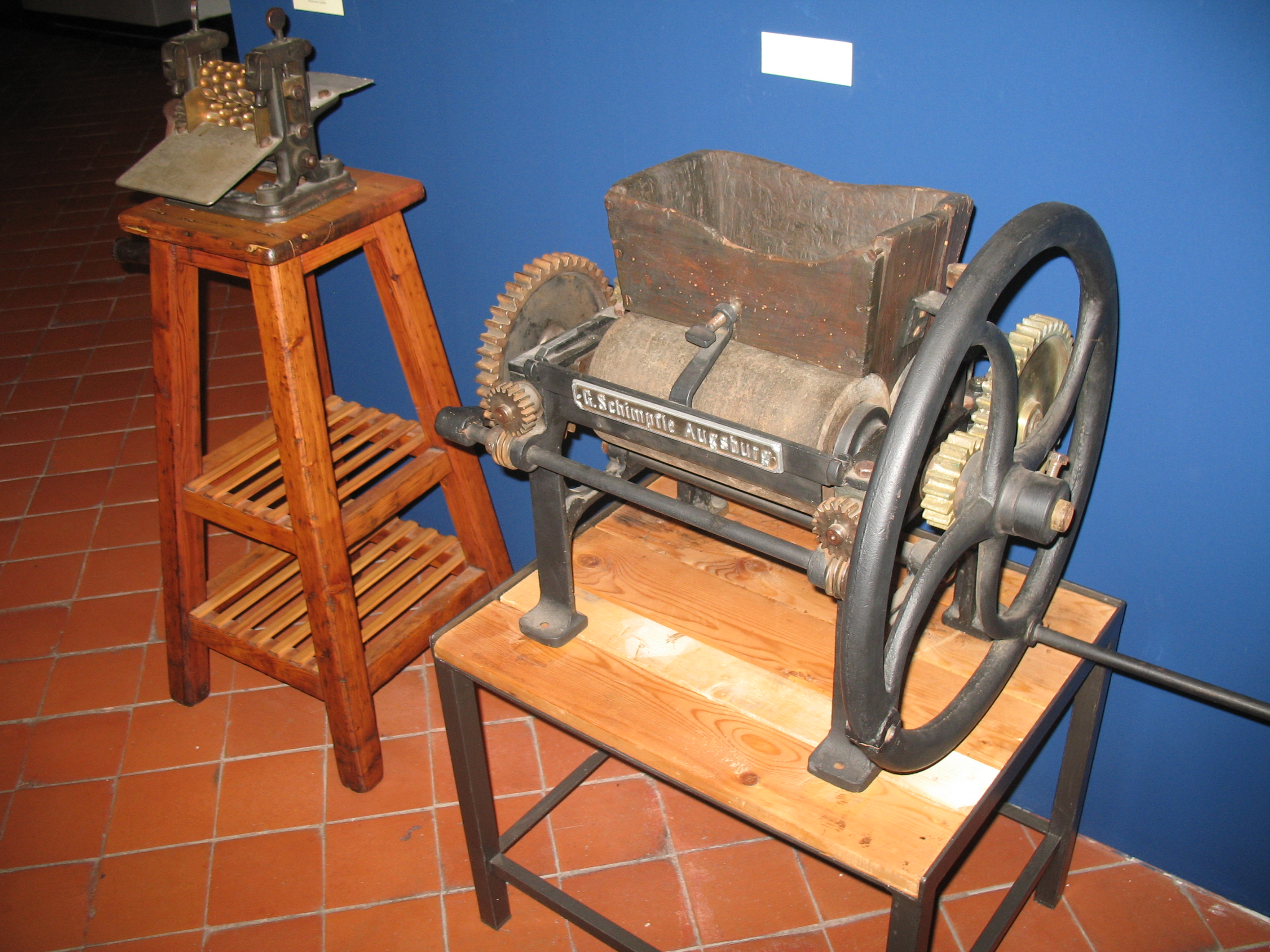 Immagine da Genova - antico macchinario per la realizzazione di biscotti